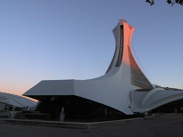 Stade Olympique de Montréal